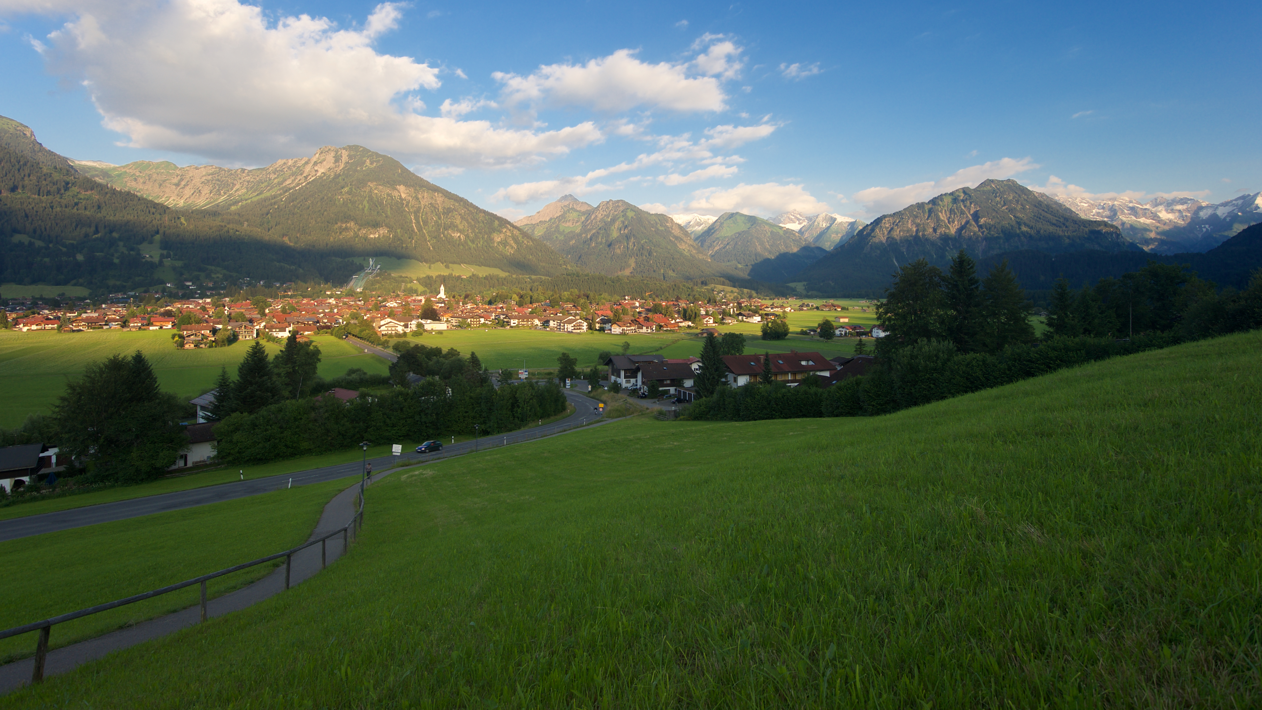 Blick auf Oberstdorf im Allgäu im Sommer 2016